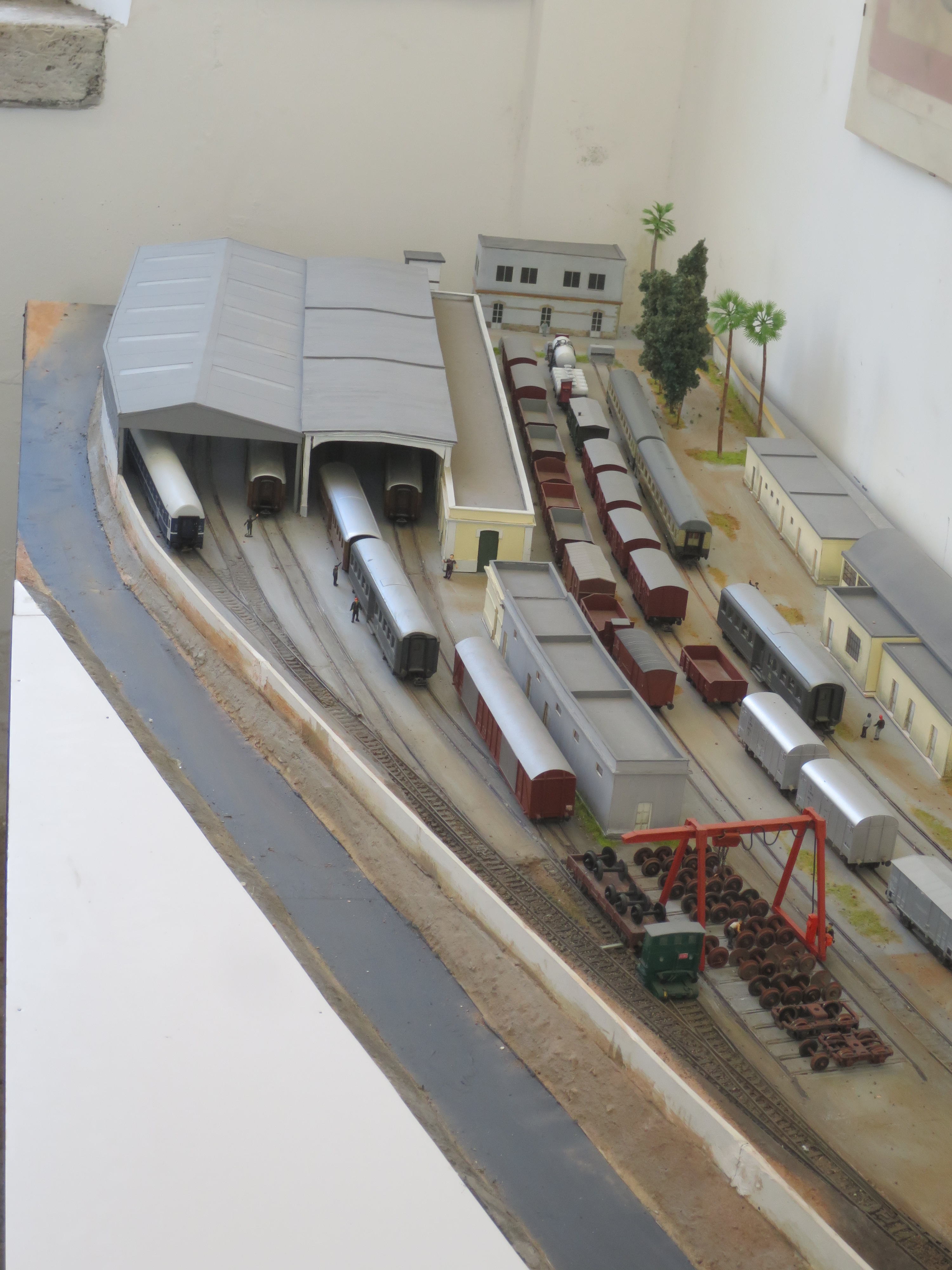 Museo Ferroviario Lecce, Modell des Museums